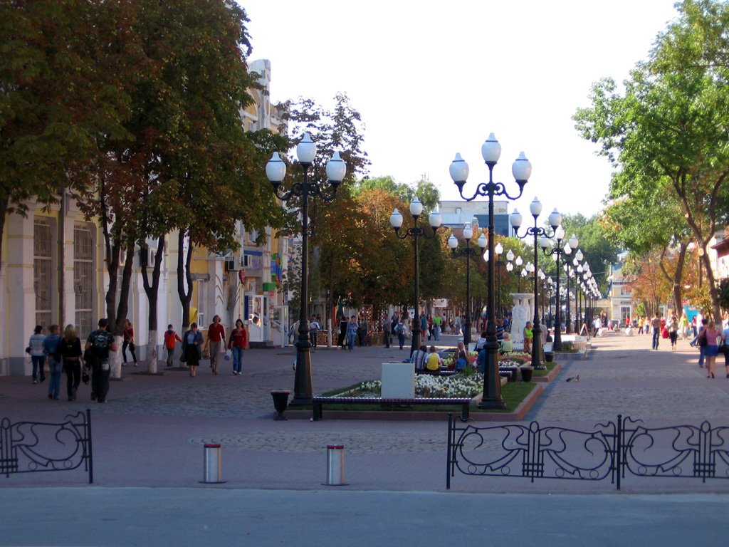 Гостиный двор города Ейска